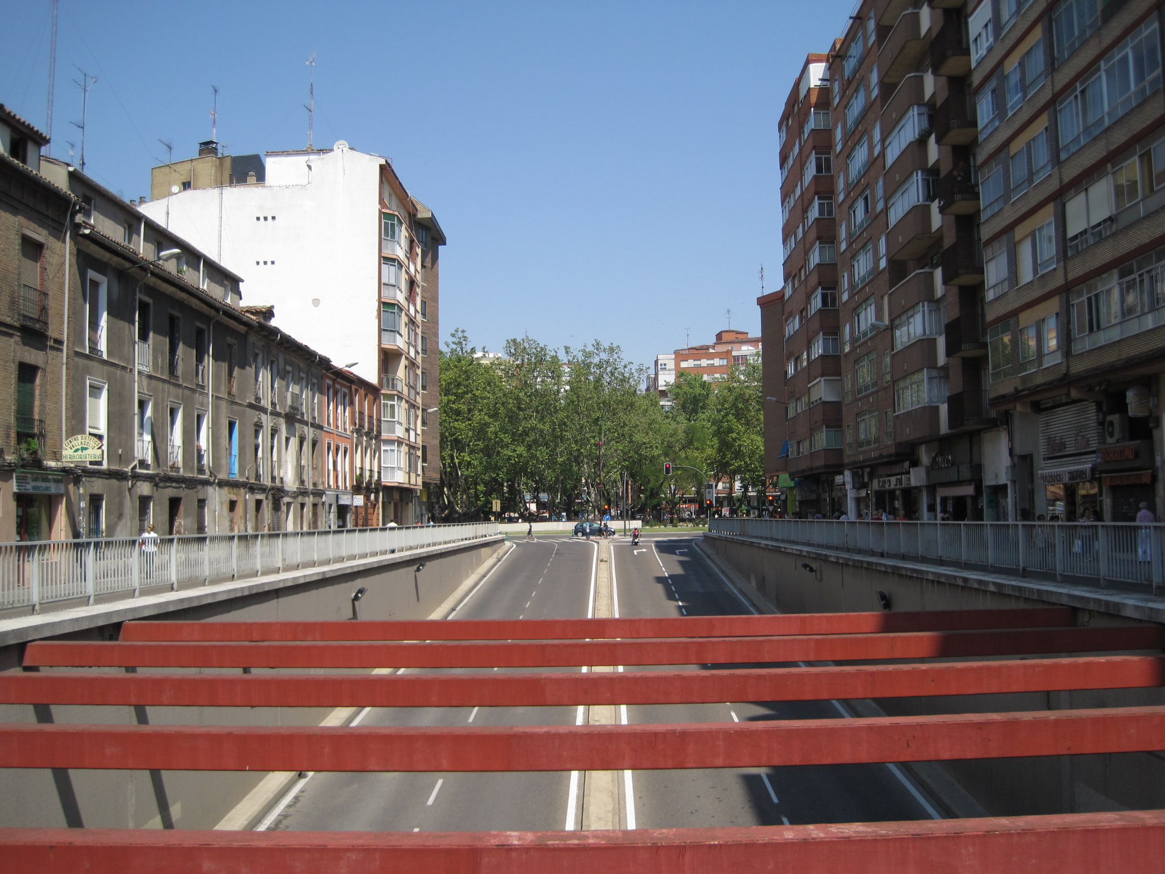 Vista de la plaza Circular desde la calle San Isidro, en Valladolid (España).